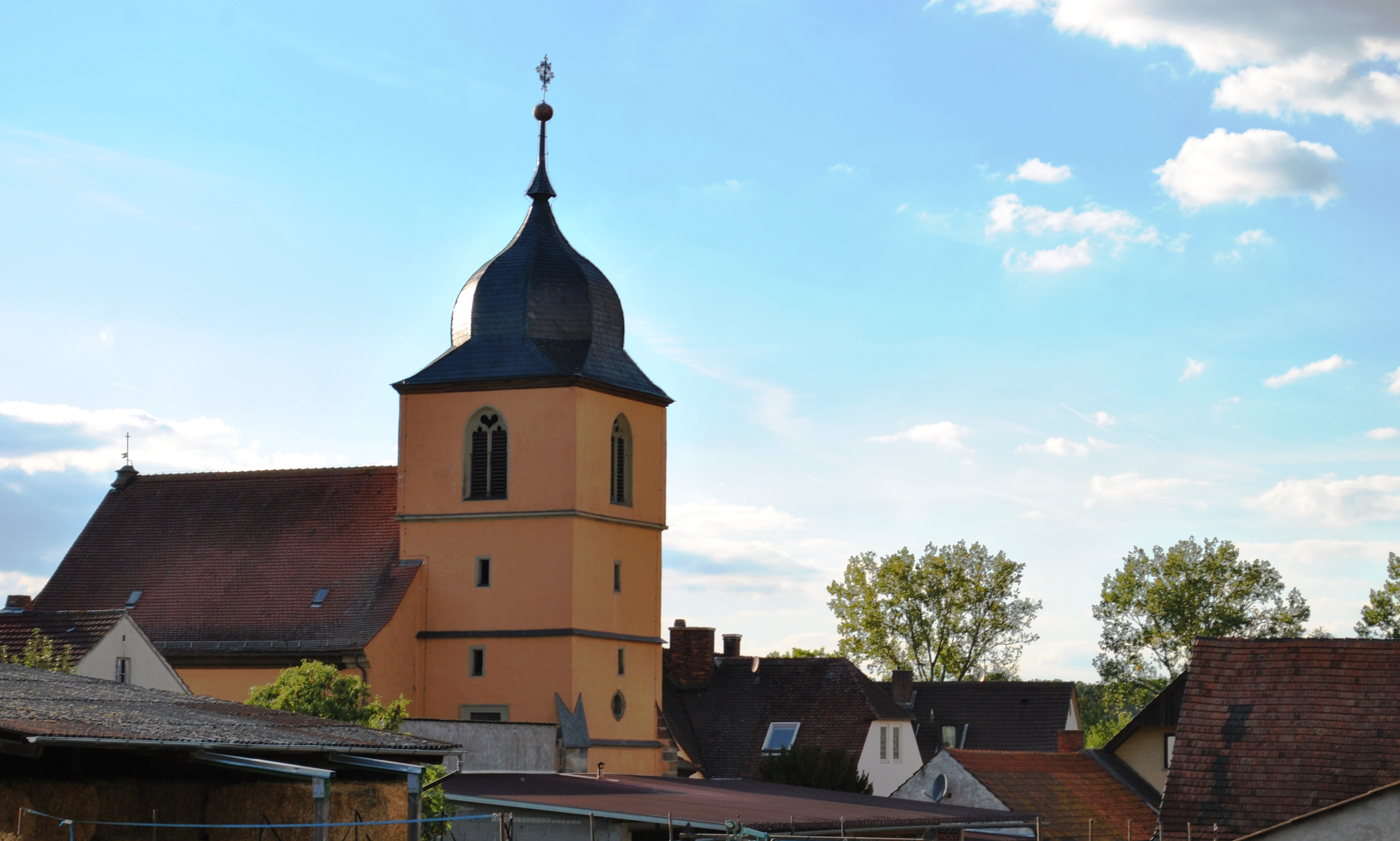 Katholische Pfarrkirche St. Sebastian Chorturmkirche, Turmuntergeschosse spätgotisch, Obergeschoss von 1610, Langhaus 1723–1724; mit AusstattungThis is a photograph of an architectural monument.